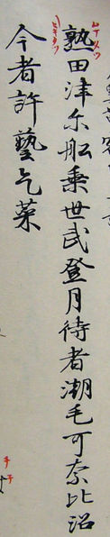 Poem of Nukata Ohkimi in the Manyousyu Text: 熟田津尓船乗世武登月待者潮毛可奈比沼今者許藝乞菜 (熟田津に 船乗りせむと 月待てば 潮もかなひぬ 今は漕ぎ出でな [にぎたつに ふなのりせむと つきまてば しほもかなひぬ いまはこぎいでな])